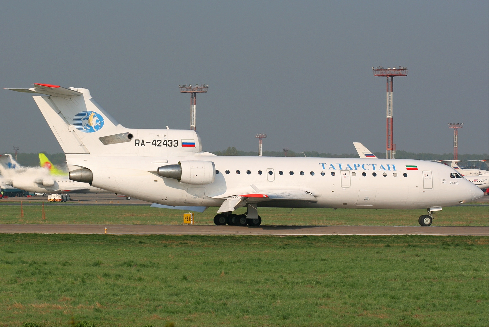 Tatarstan Airlines Yakovlev Yak-42